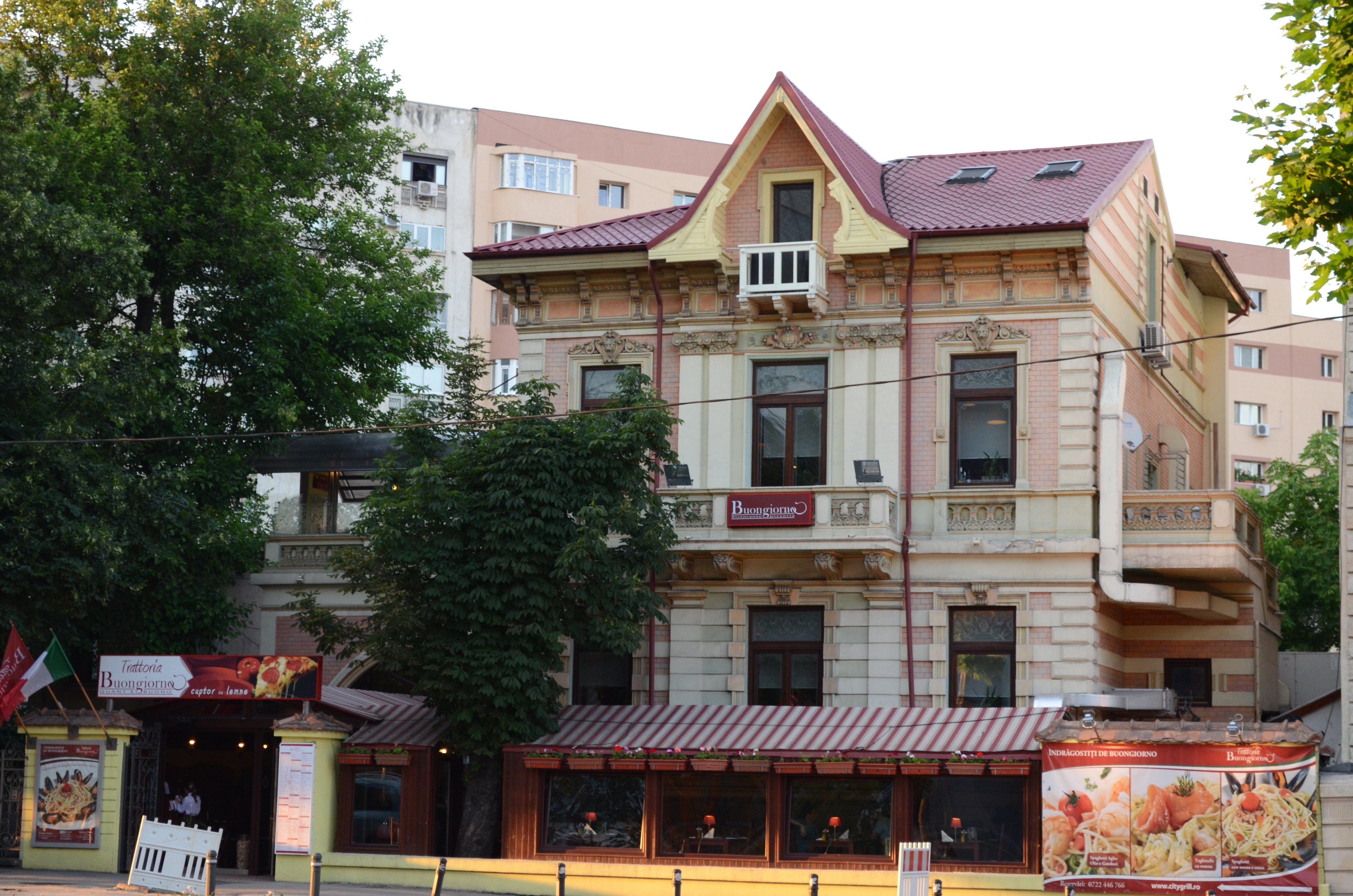 Bd. Lascăr Catargiu nr. 56, București